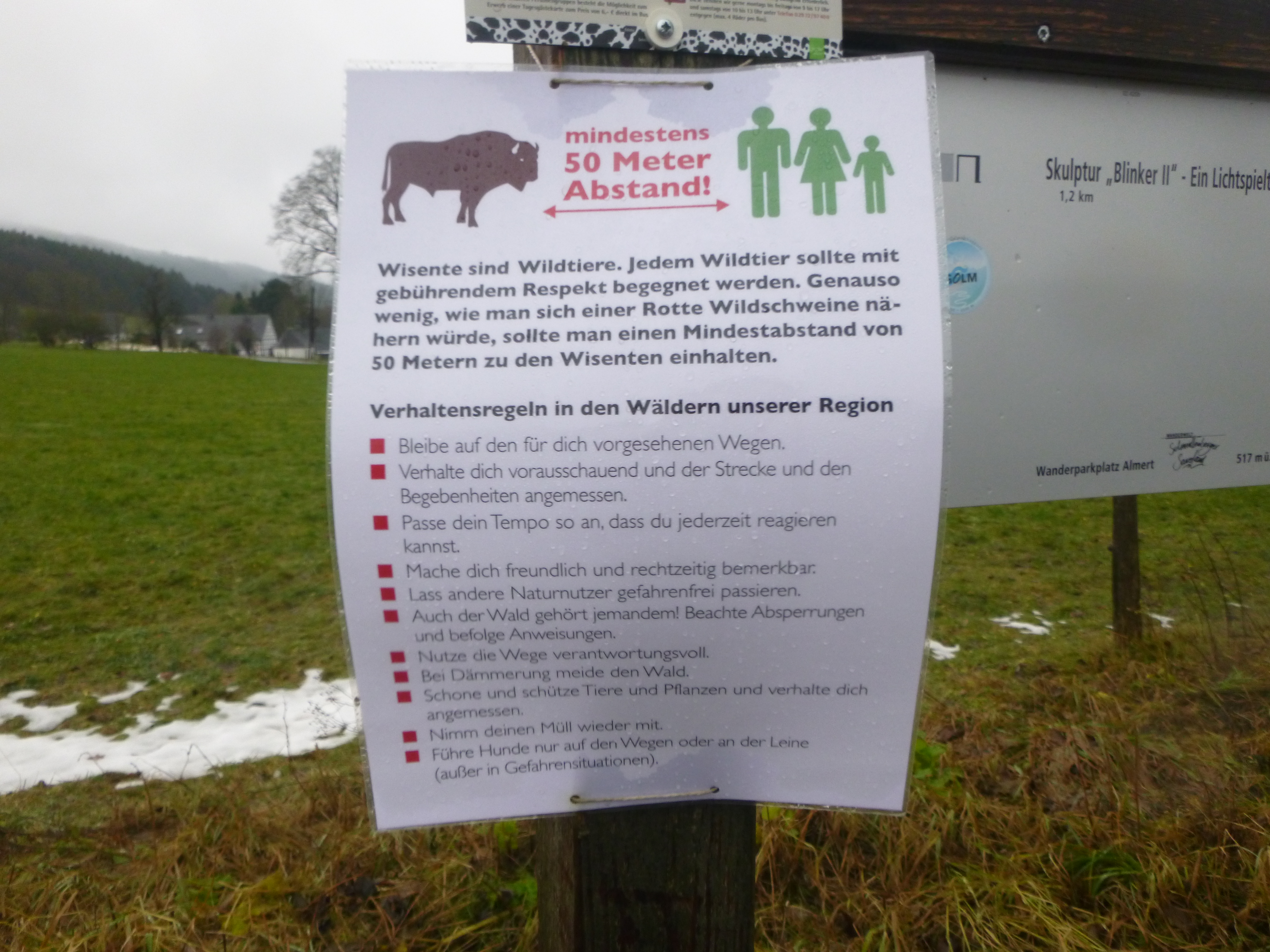 Info für die Bevölkerung im Landschaftsschutzgebiet Offenlandmulde Grafschaft - Almert.